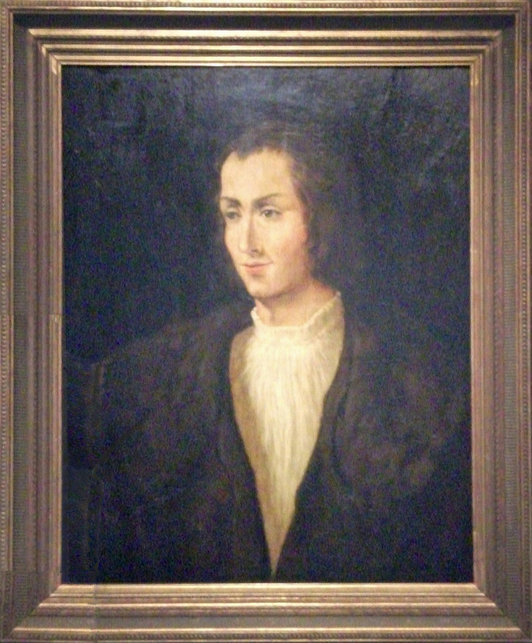 Tableau représentant Thibault_IV_comte_de_Champagne, de Blois, de Chartres, de Meaux, de Châteaudun, et de Troyes dit Thibaut le grand; présenté dans la demeure dite des comtes de Champagne.